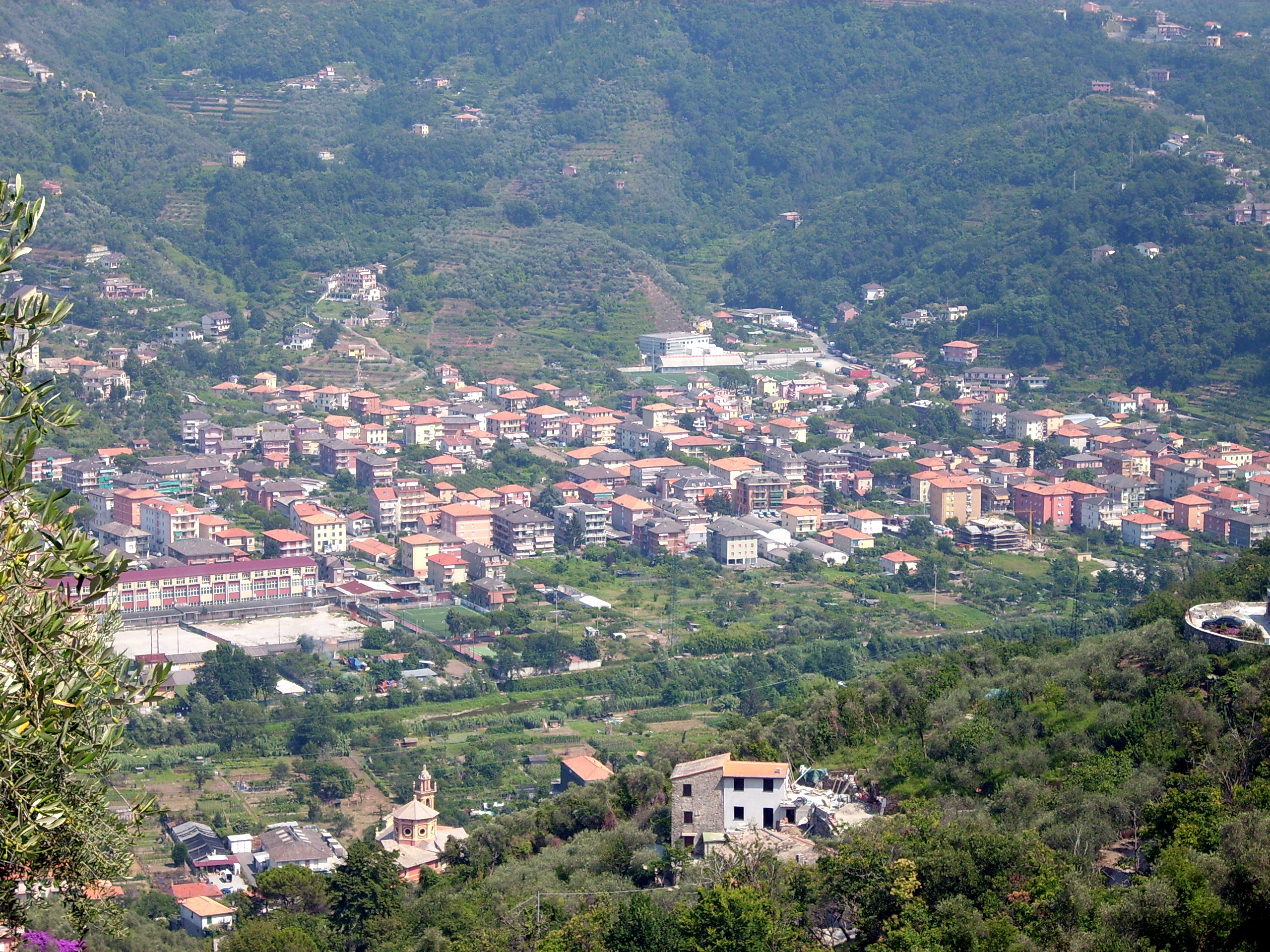 Panorama di Cogorno e della frazione di San Salvatore, Liguria, Italia